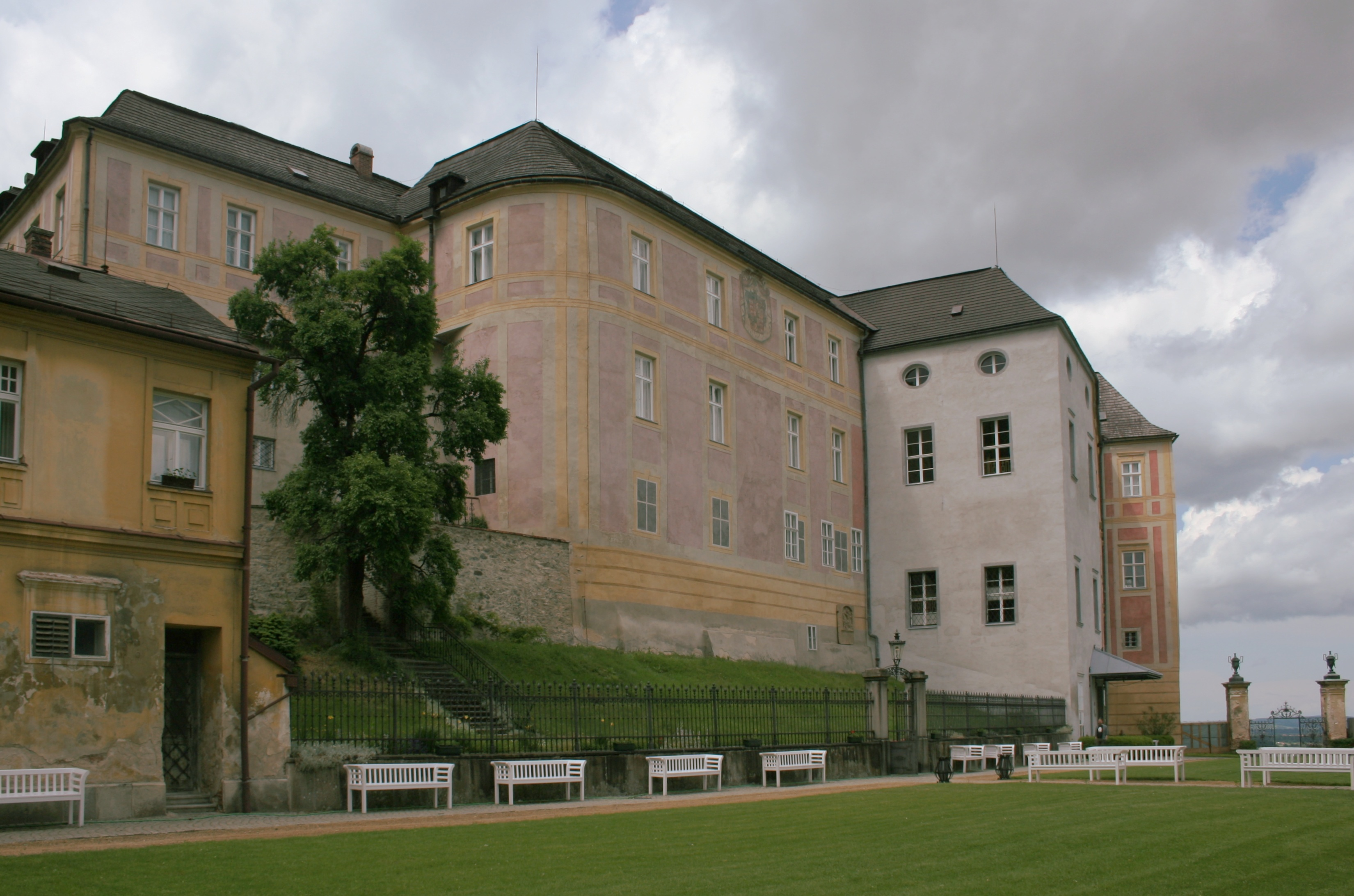 Jánský Vrch w Javorniku, Czechy